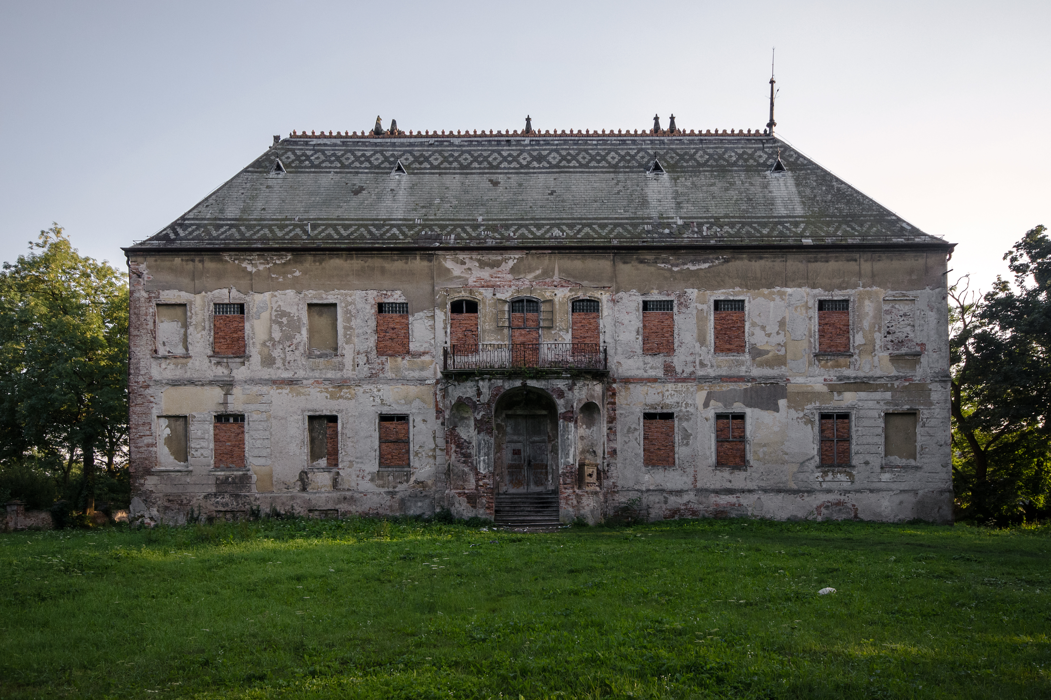 Osiek Grodkowski - pałac, 1 poł. XVIII, XIX (elewacja od strony folwarku)